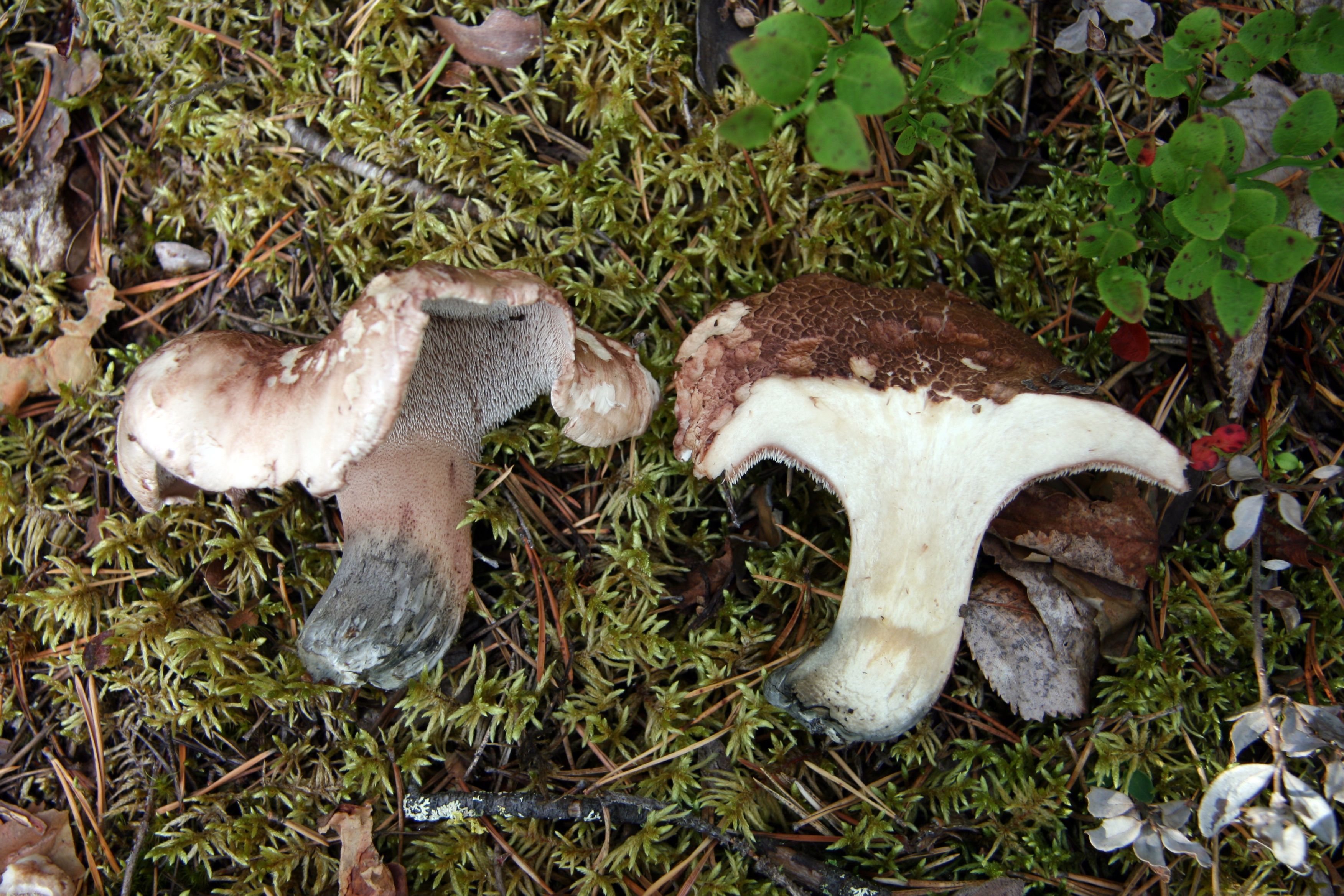 Skrovlig taggsvamp